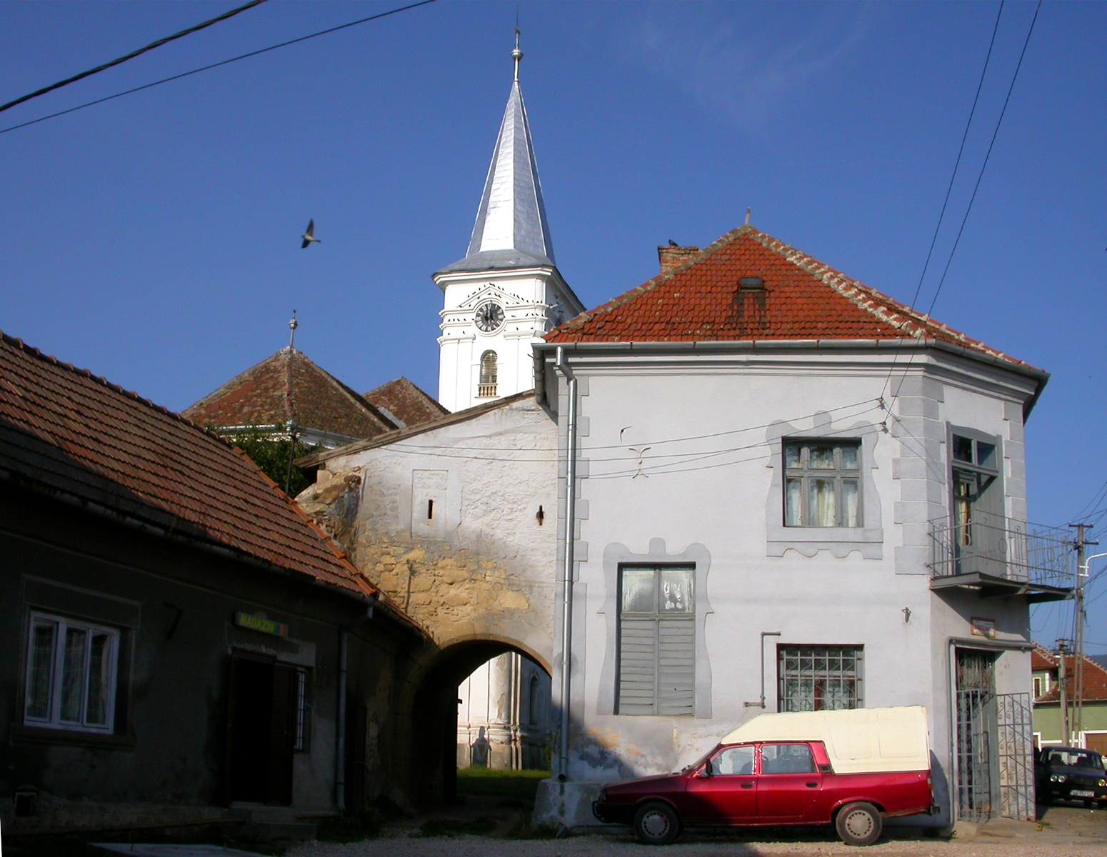 Ansamblul bisericii reformate, sec. XV - XVIII